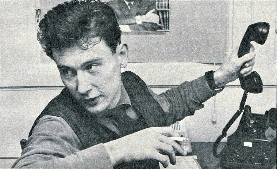 Ulf Thorén.